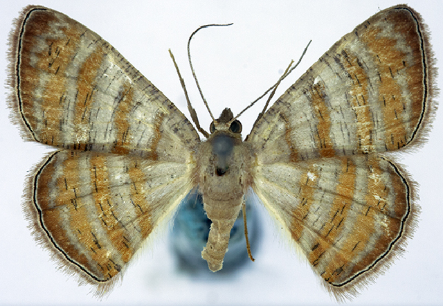 Casbia isogramma